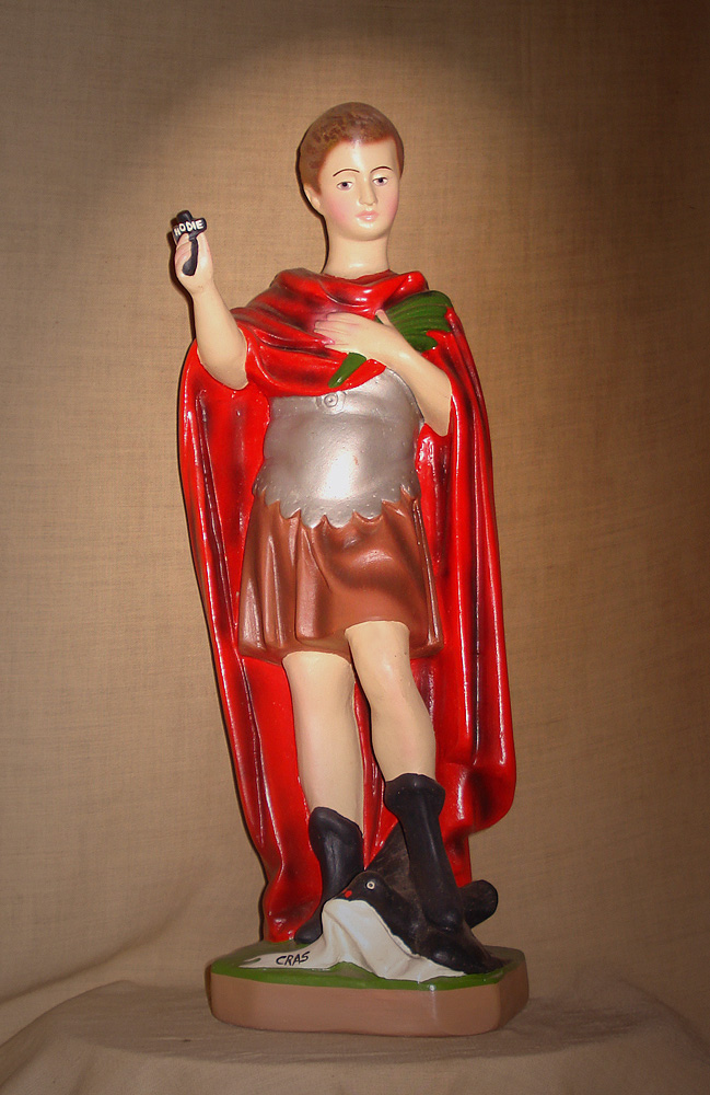 Santo Expedito, produção do antigo Atelier Zambelli, Caxias do Sul, Brasil.